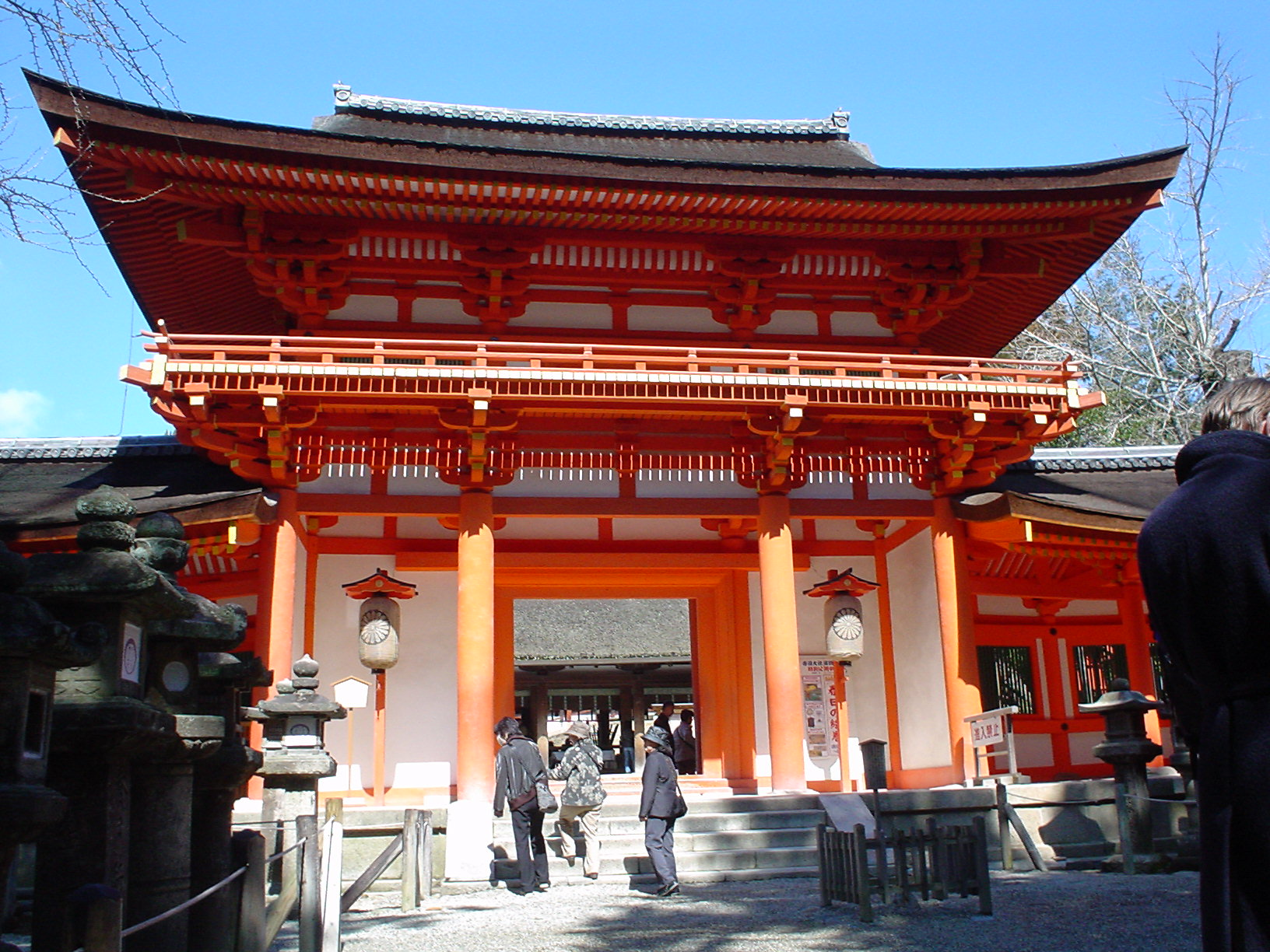 Kasuga Taisha's gate (romon), Nara, Nara, Japan 春日大社の楼門（奈良市奈良公園）